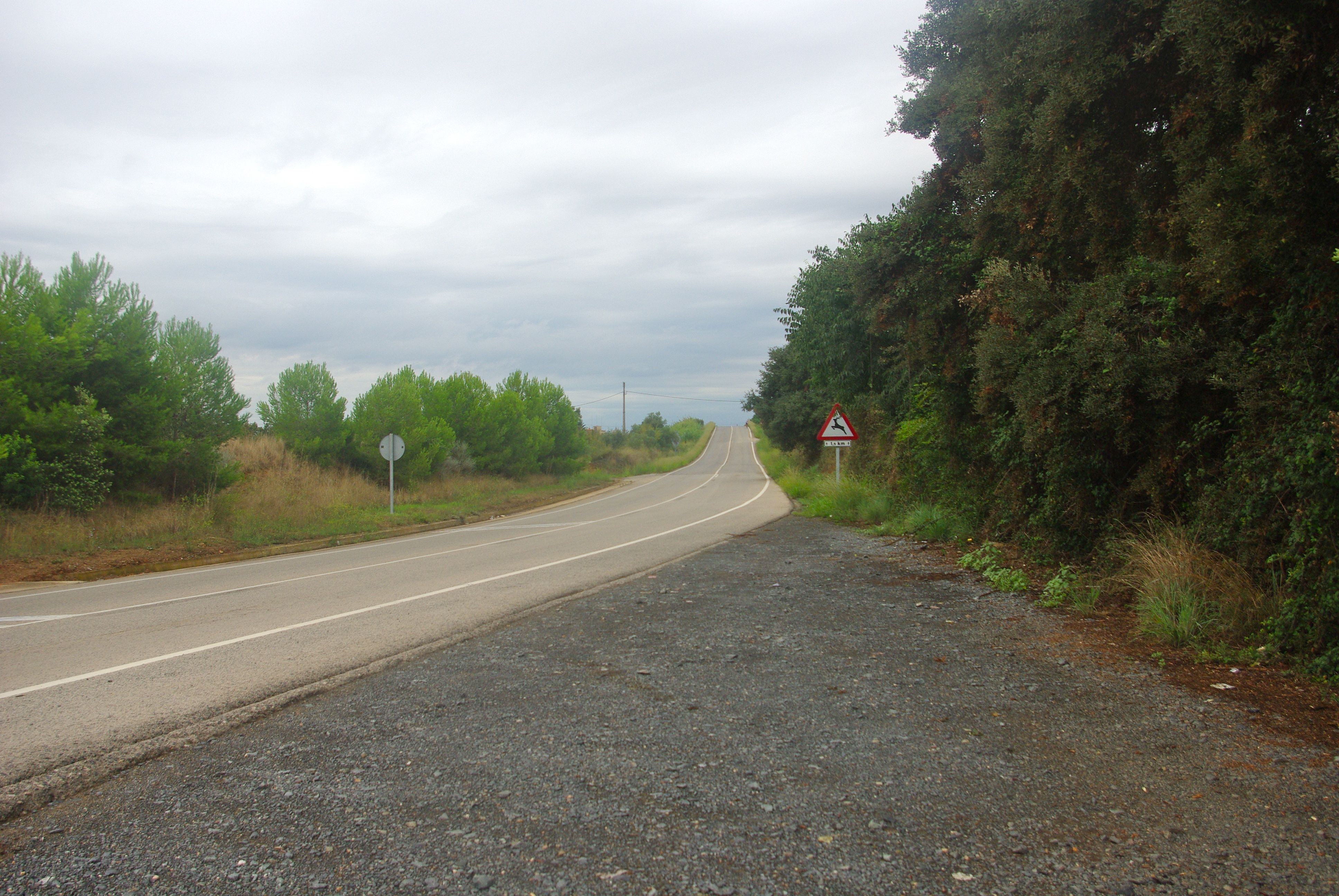 Carretera de Sant ramon, al terme de Reus